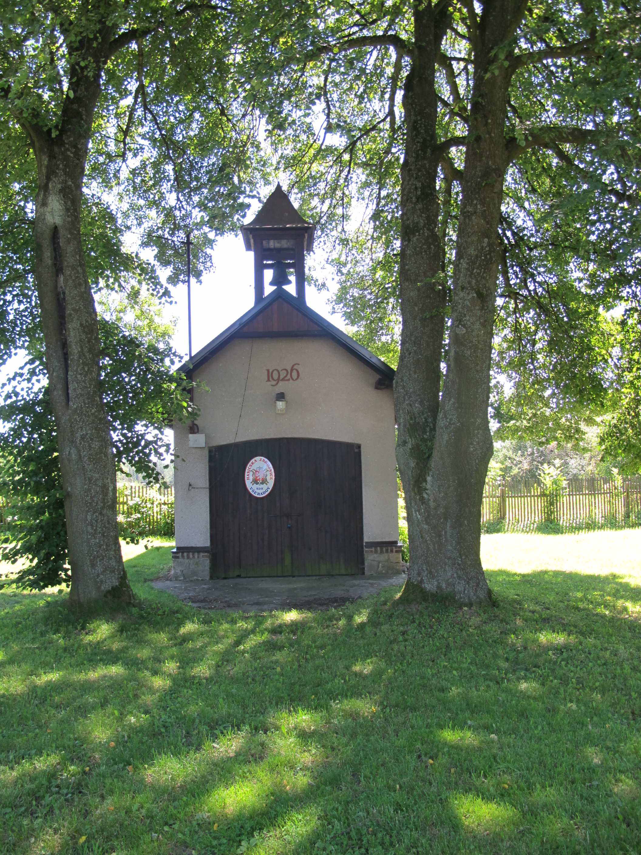 Všeradov.